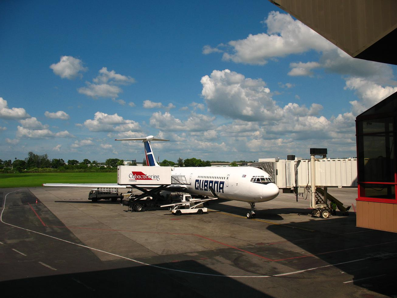 Avión de Cubana de Aviación en el Aeropuerto Internacional José Martí de La Habana